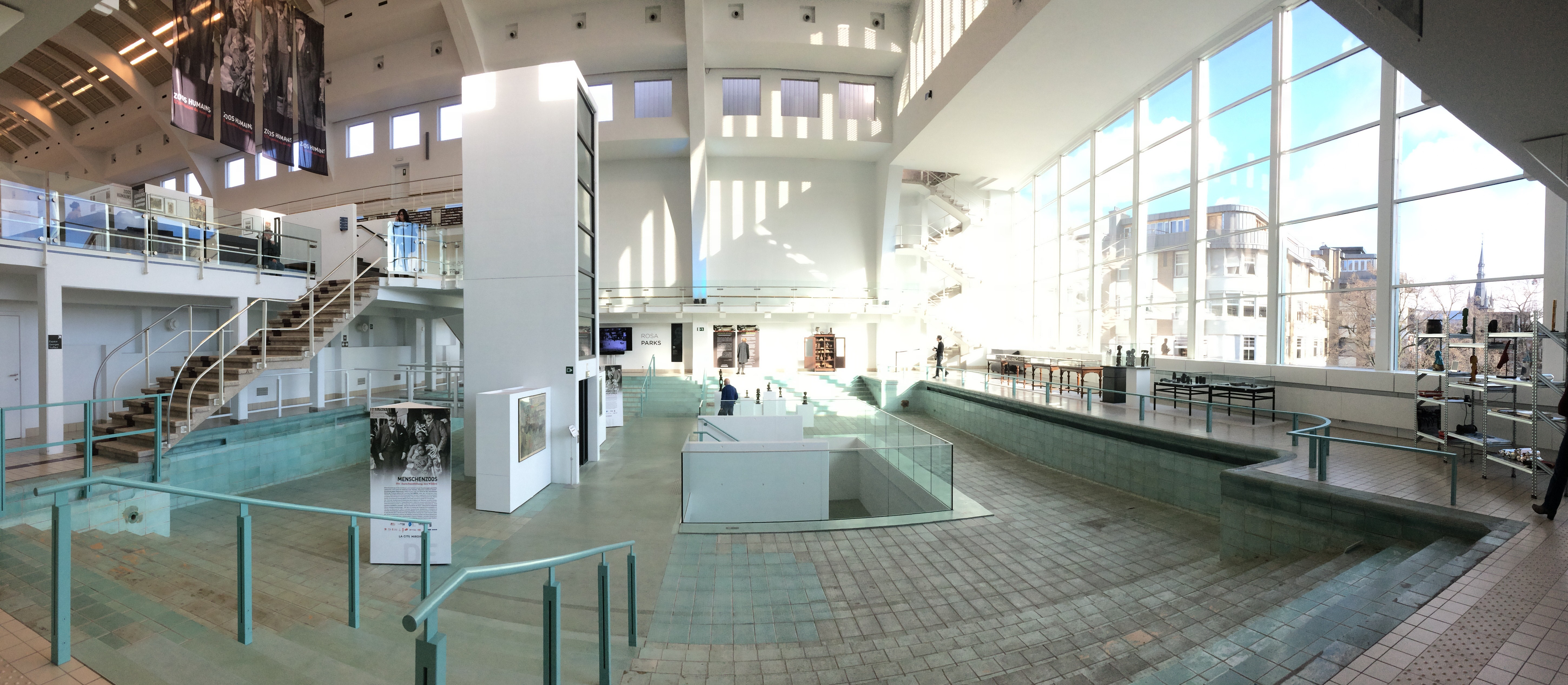 Exposition 2017: "ZOOS HUMAINS : L'INVENTION DU SAUVAGE" à la Cité Miroir